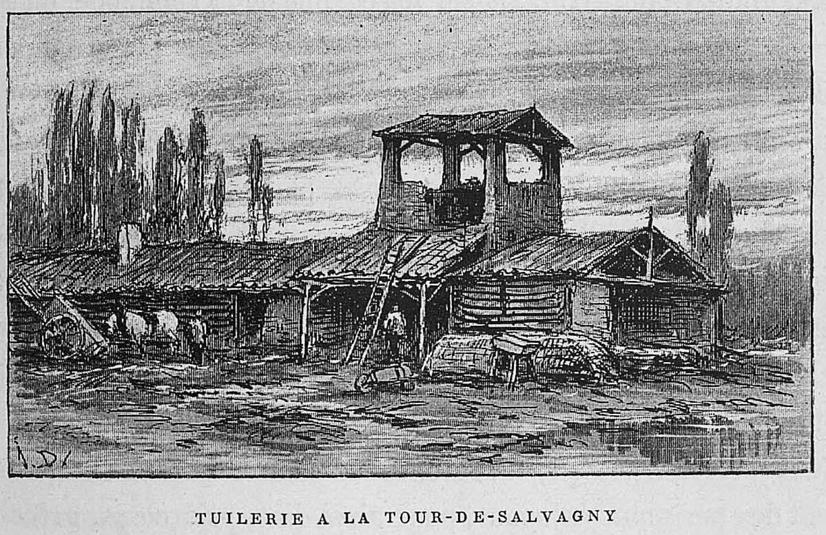 Aux environs de Lyon / Monsieur Josse ; préface de M. Coste-Labaume ; édition illustrée de 250 dessins de J. Drevet.